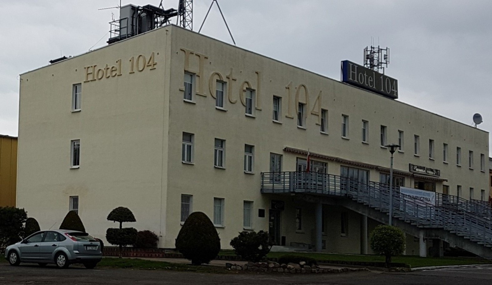 Obecna siedziba Spójni w kompleksie sportowym przy ul. I Brygady, wejście dolne od prawej